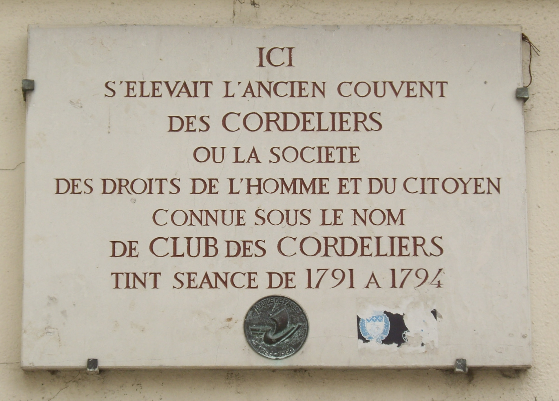 Plaque apposée au n° 15 de la rue de l'École-de-Médecine, Paris 6e. « Ici s'élevait l'ancien couvent des Cordeliers où la Société des droits de l'homme et du citoyen connue sous le nom de Club des Cordeliers tint séance de 1791 à 1794. »